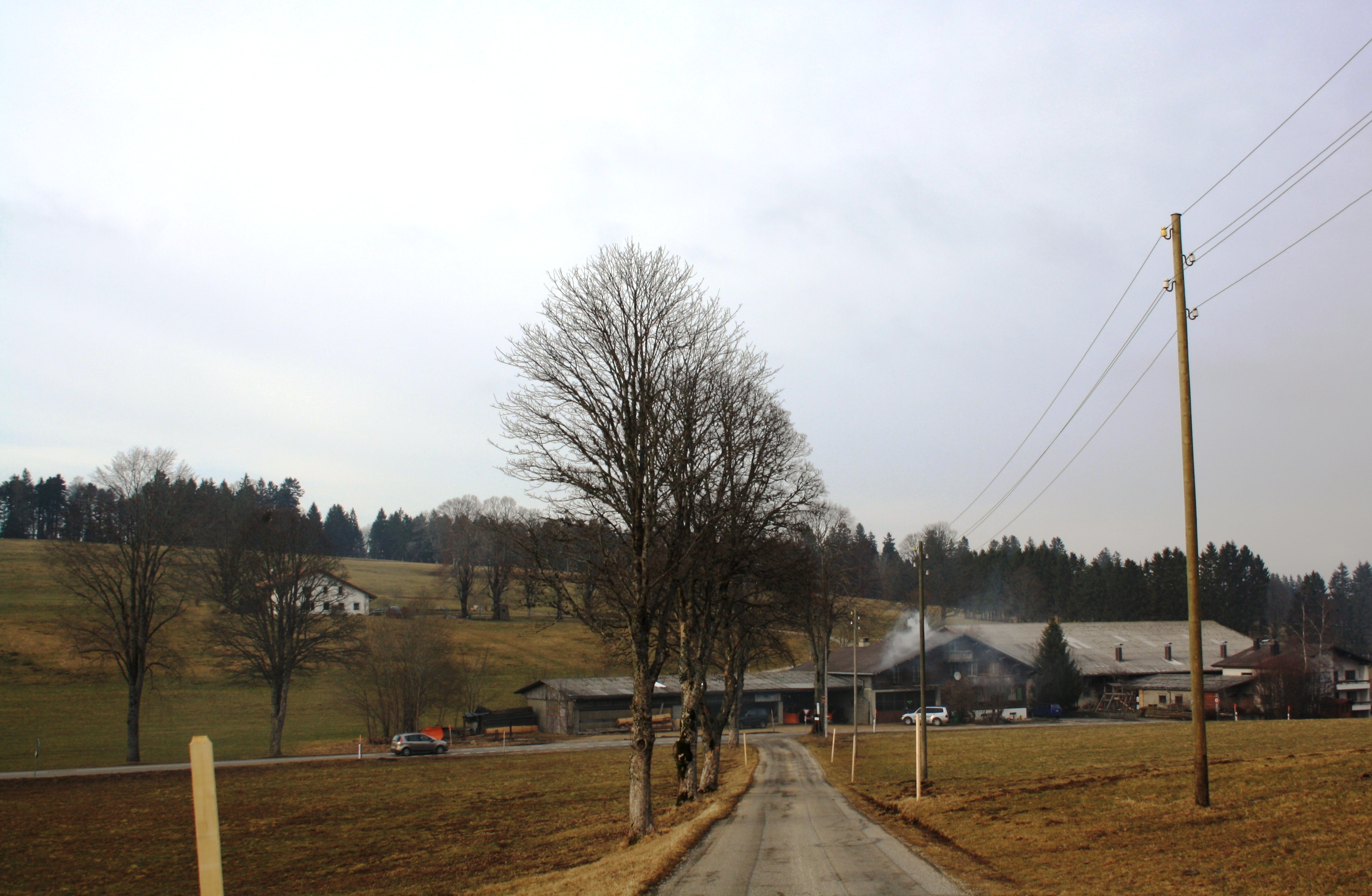 Mont-Tramelan